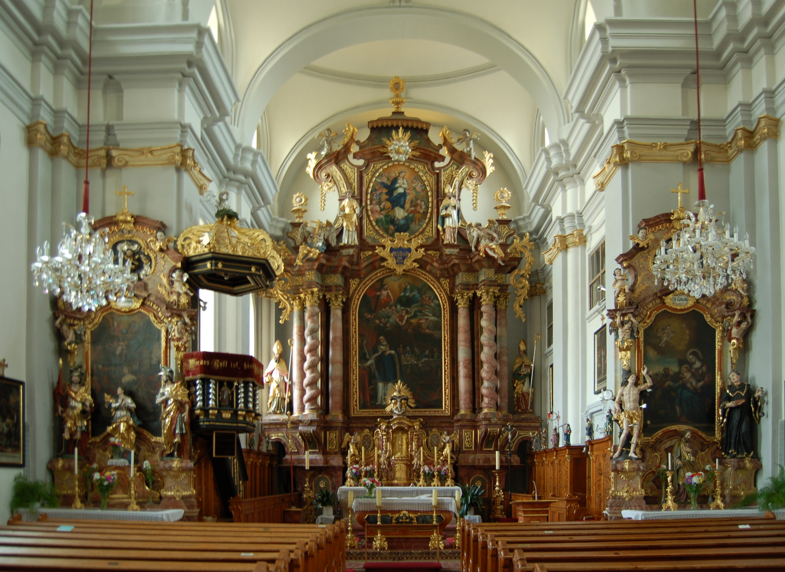 Die Pfarrkirche der Gemeinde Hofkirchen im Mühlkreis im Bezirk Rohrbach (Oberösterreich). Die dreijochige, spätbarocke Saalkirche mit halben Vorjoch vor dem mächtigen Westturm besitzt einen zweijochigen Rechteckchor und einen zweigeschoßigen, südseitigen Anbau der als Sakristei bzw. Oratorium dient. Die Kirche wurde nach einem Brand 1636 wiedererrichtet und schließlich in der ersten Hälfte des 18. Jahrhunderts unter Einbeziehung des gotischen Turms neu gebaut.